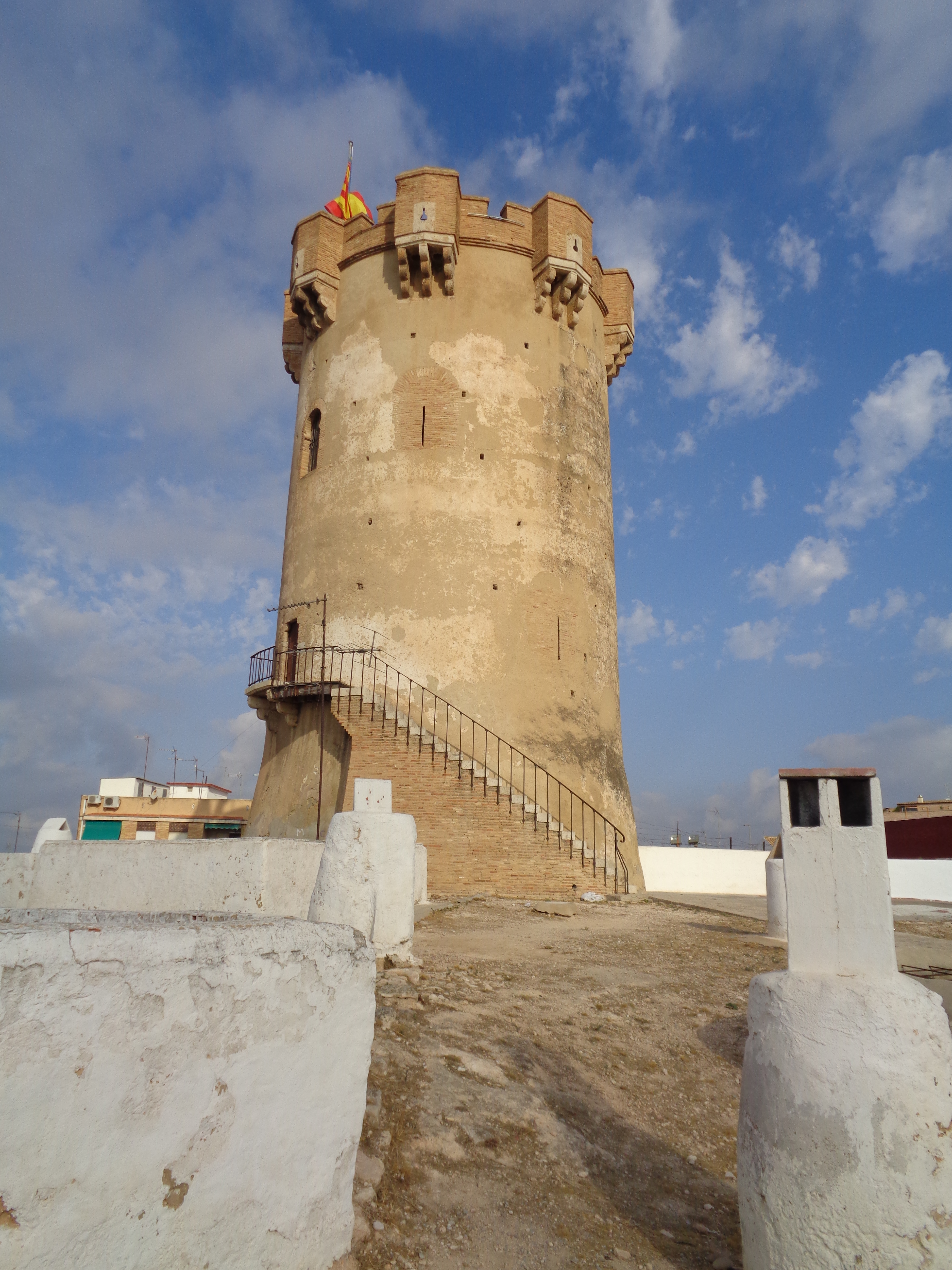 Torre de Paterna.